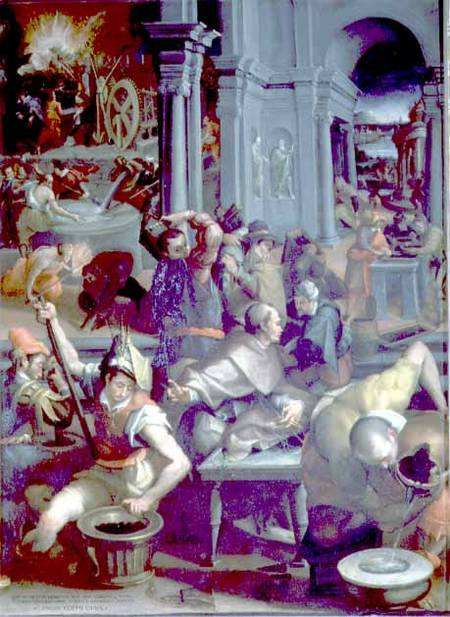 La invención de la pólvora, Studiolo de Francesco I, Palazzo Vecchio, Florencia